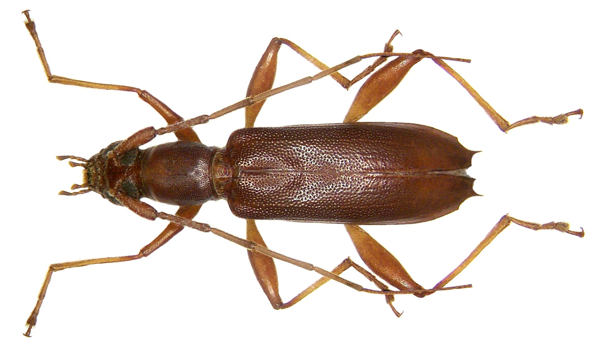 Familie: Cerambycidae Groesse: 17 mm Fundort: Indonesien, Irian Jaya, Salawati-Isl., Kalian leg. A.Skale, 2004; det. A.Weigel, 2004 Photo: U.Schmidt, 2006